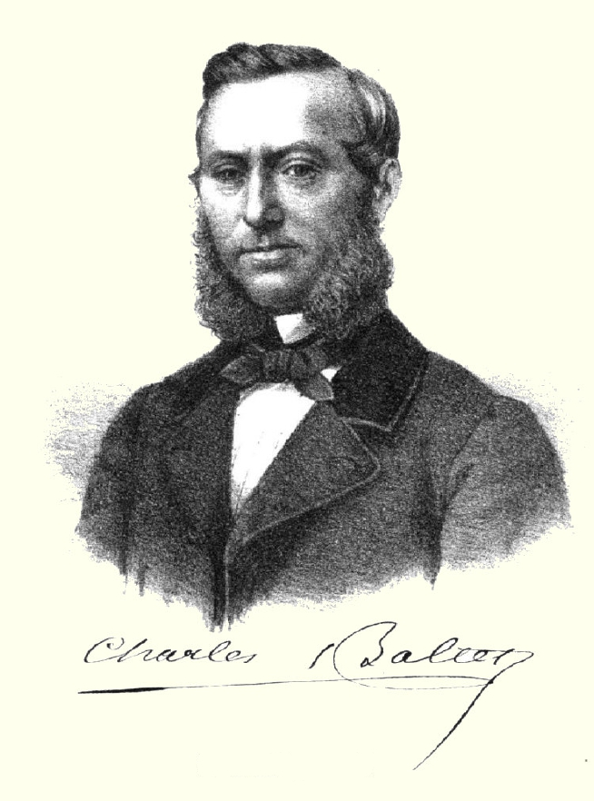 Porträt von Charles Appolinaire Baltet (um 1867)